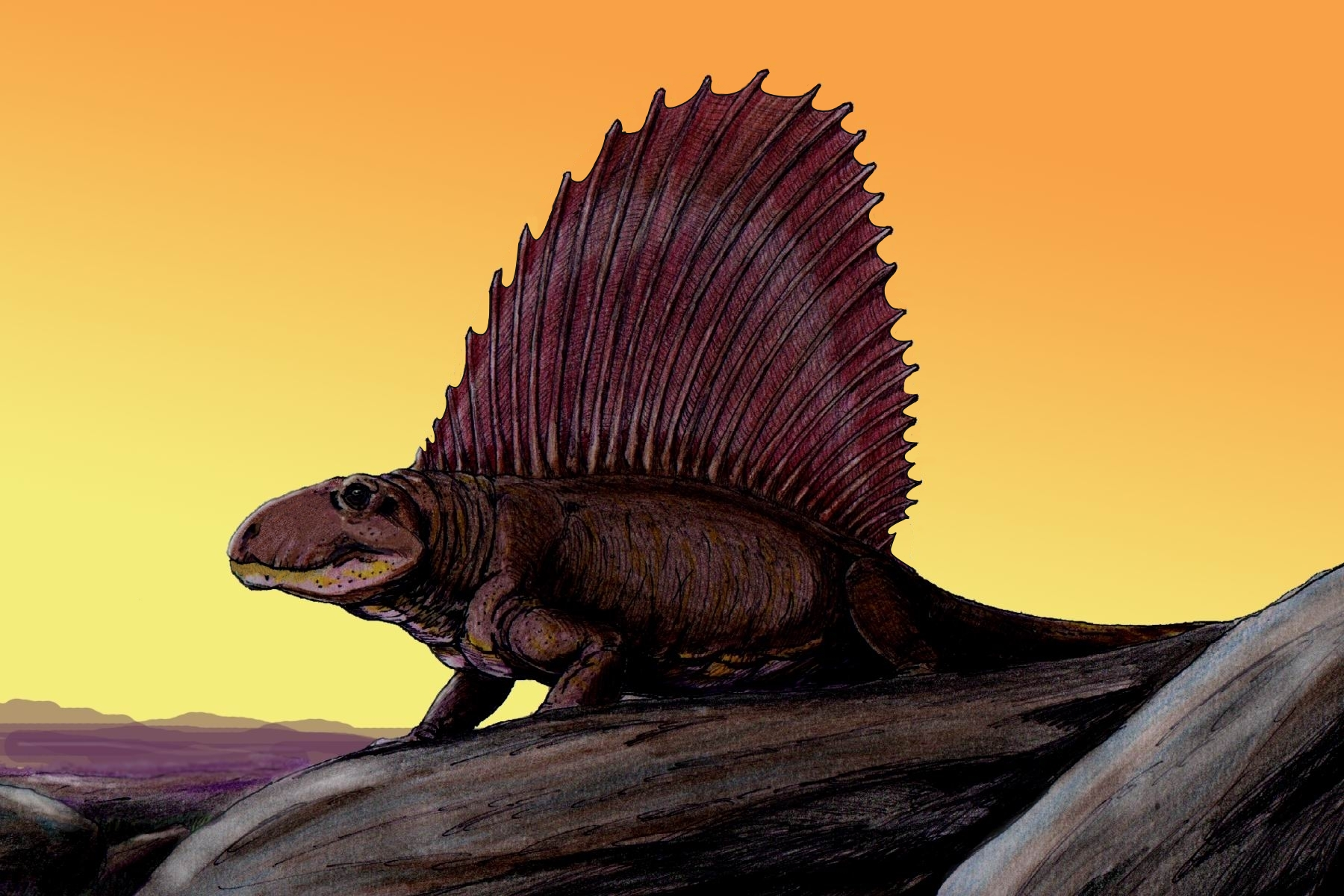 Dimetrodon grandis on sunrise